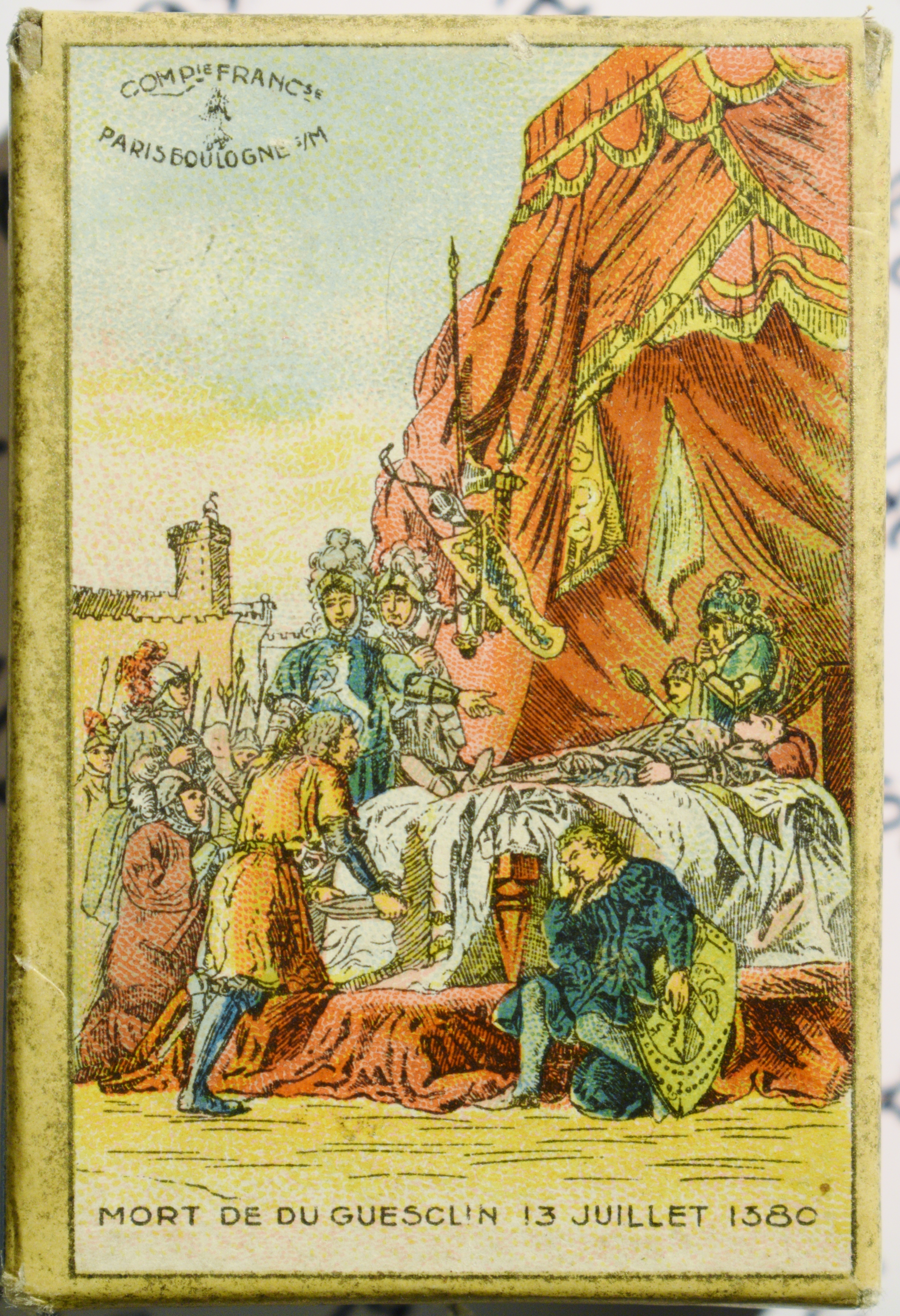 Capsa de plomes.